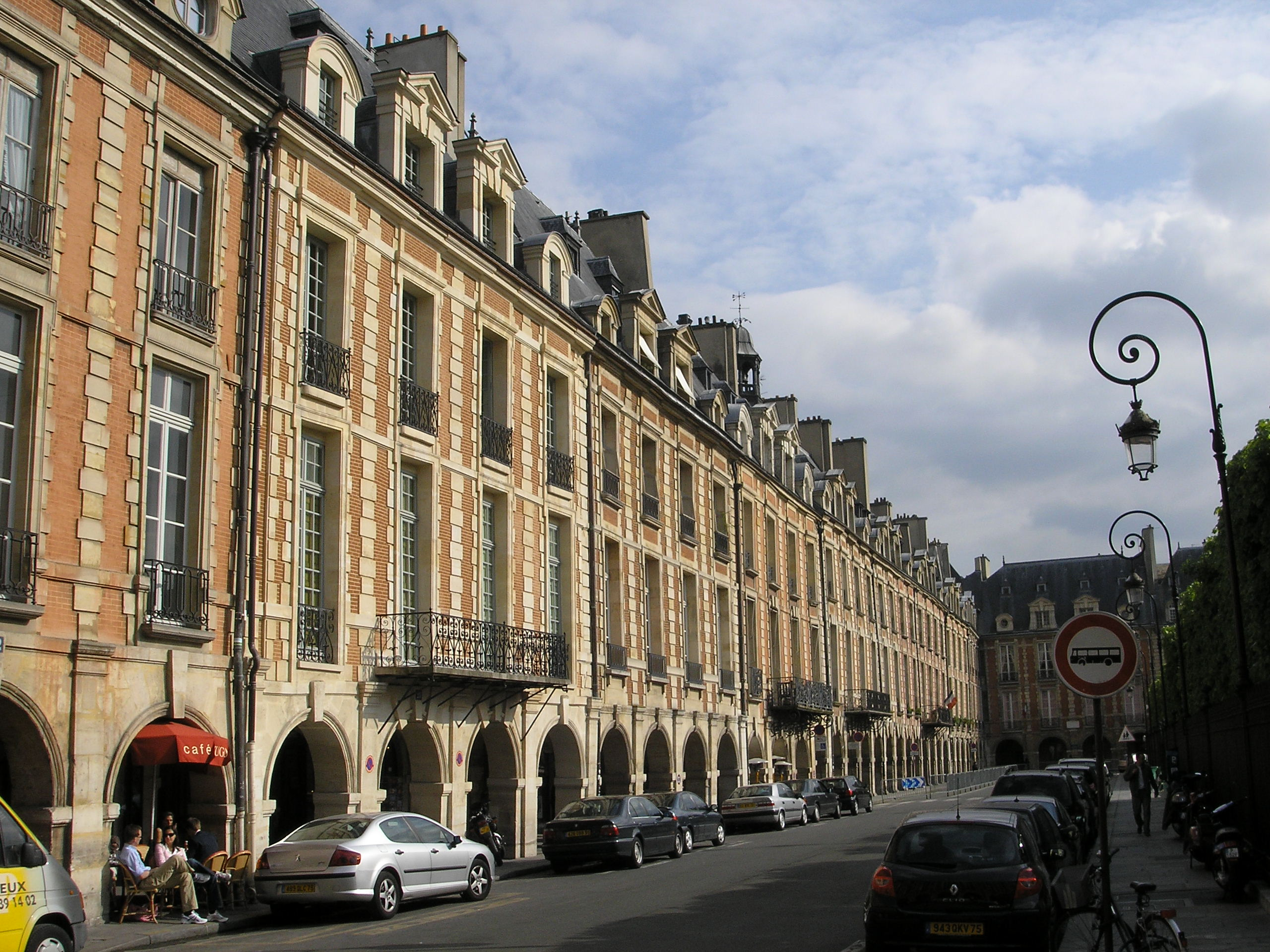 Place des Vosges in Paris, eastern side.